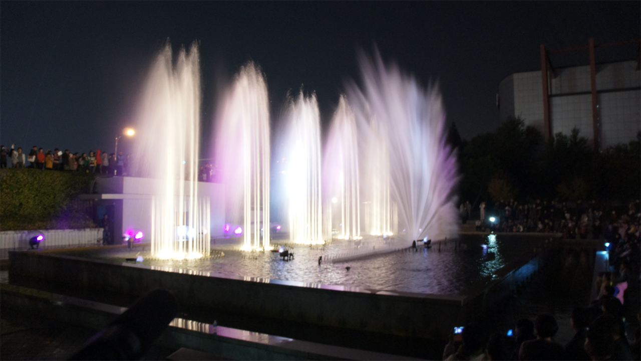 엑스포과학공원 음악분수 (2012 대전 국제 푸드&와인 페스티벌 행사 당시)